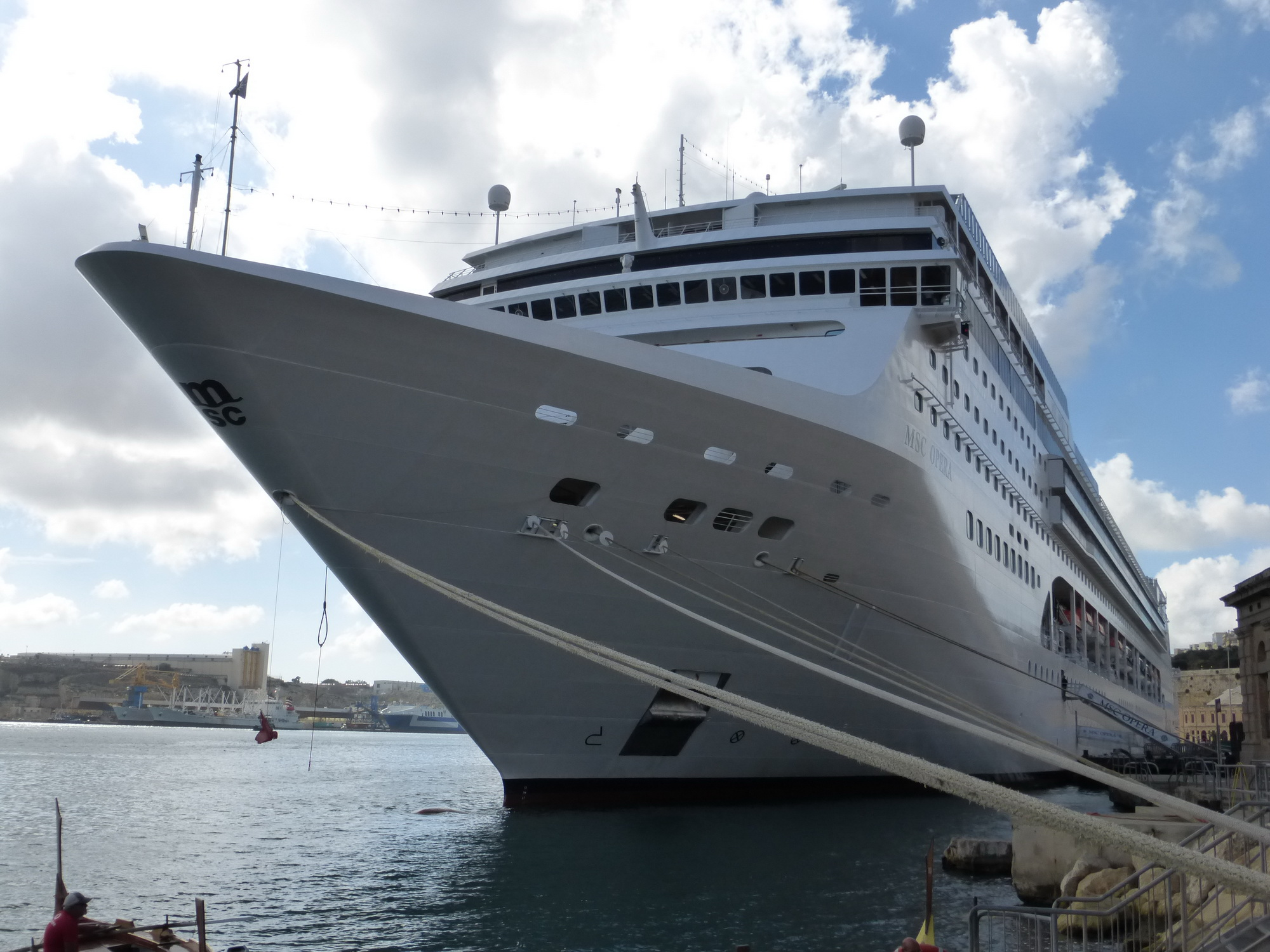 Bug der MSC Opera im Hafen von Valletta (Malta)